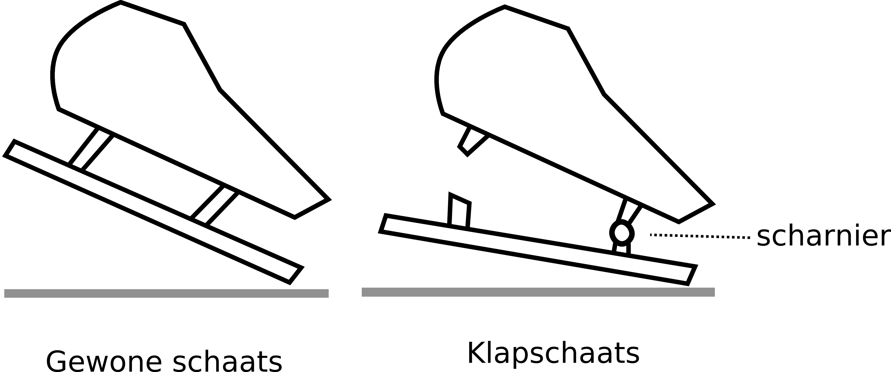 zelf, inkscape